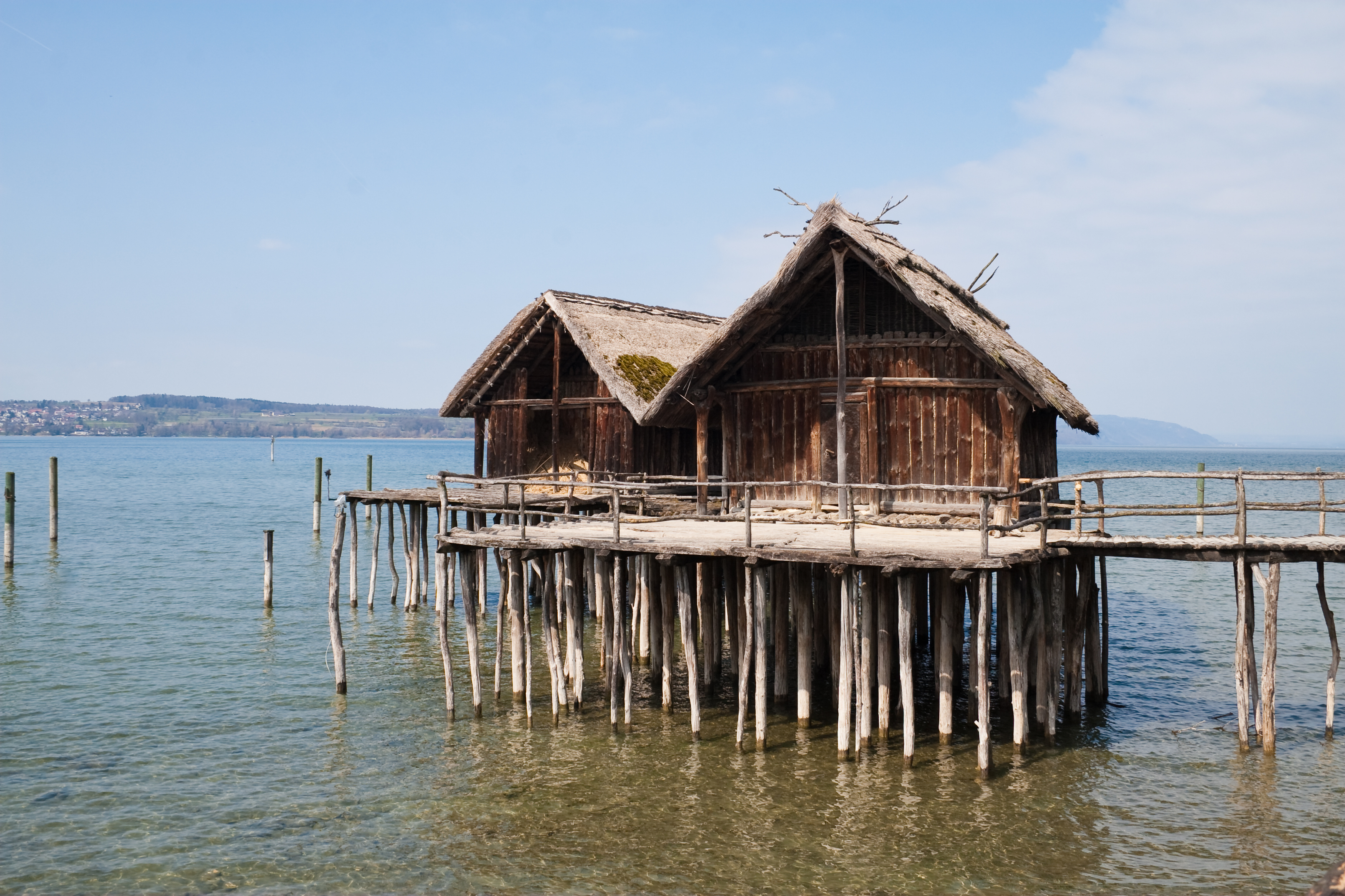 Pfahlbaumuseum Unteruhldingen, Uhldingen-Mühlhofen, Baden-Württemberg, Germany